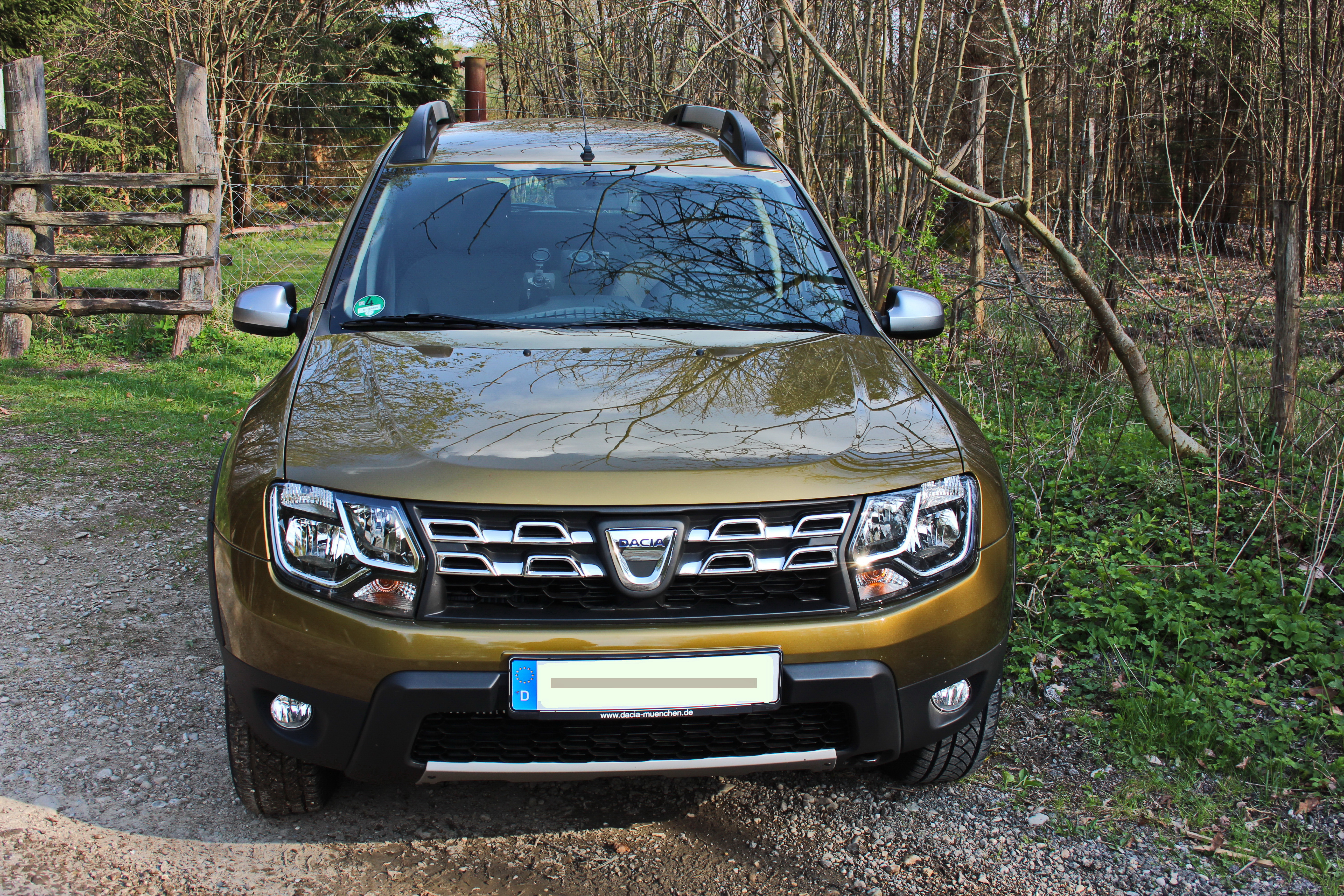 Dacia Duster Urban Explorer